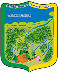 Colores Verde y Amarillo que representan nuestras riquezas naturales.